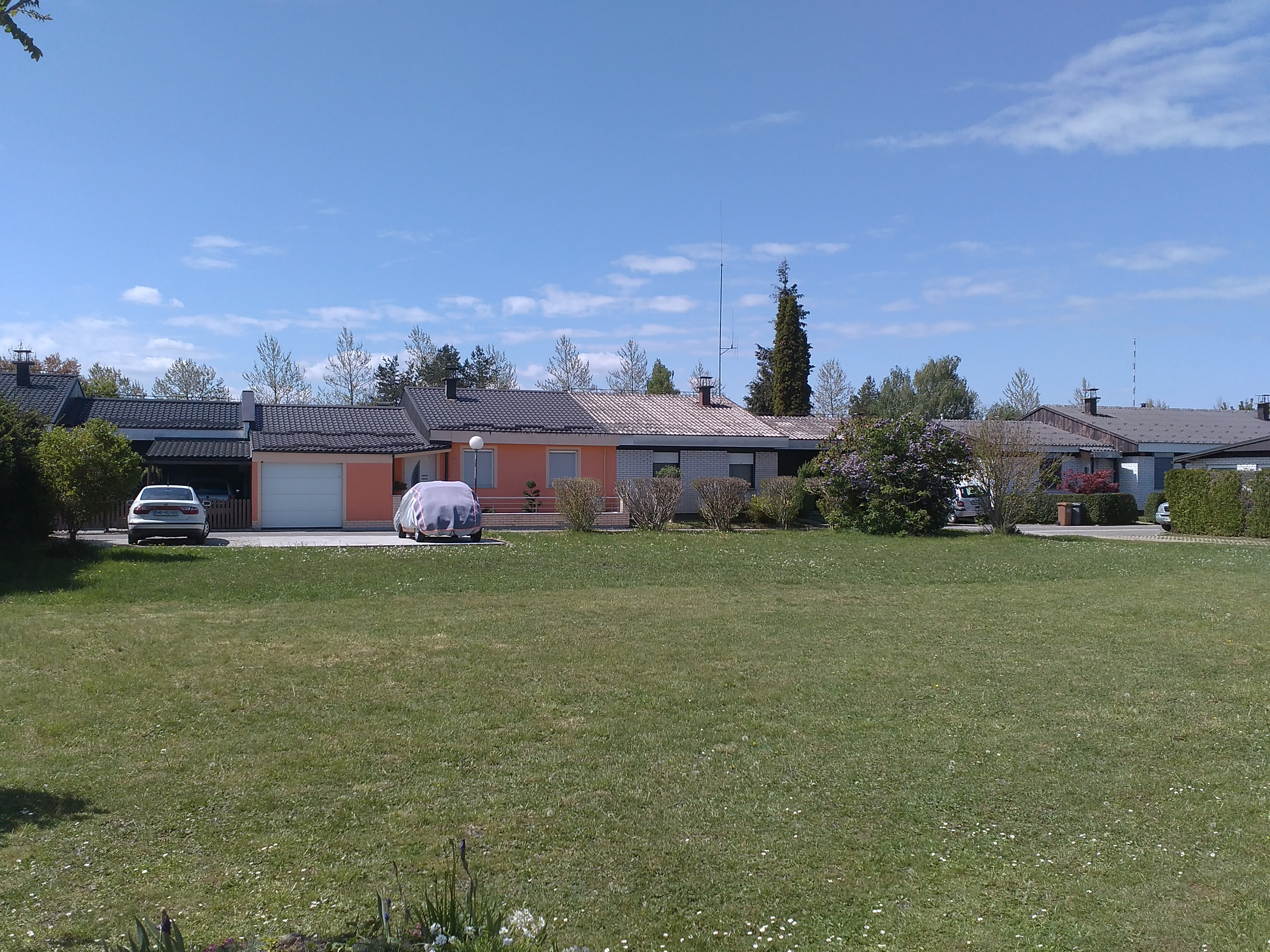 Vrstne hiše Tezno, Maribor